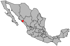 Locator map of Culiacán, Sinaloa, Mexico